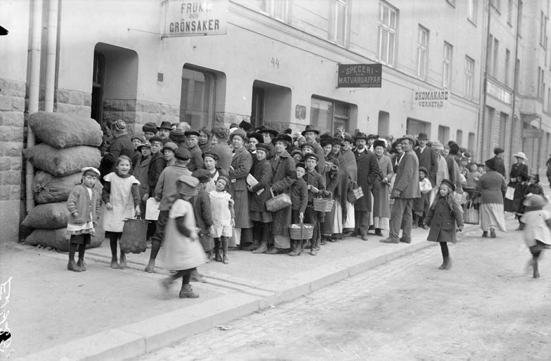 Stockholms stadsmuseum Fotonummer E 14291